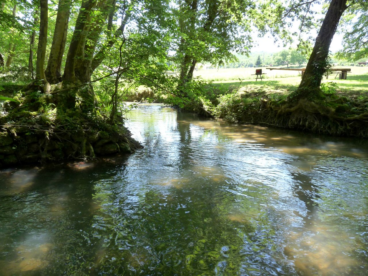 Illustration de la rivière Couze, affluent de la Dordogne dans le département de la Dordogne. Image située sur la commune de Bayac.